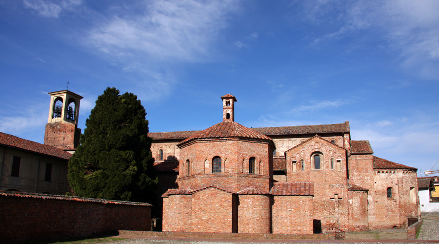 Il complesso religioso dalla romanica Basilica di Santa Maria Maggiore, con il battistero, la chiesa ed il campanile, a Lomello.